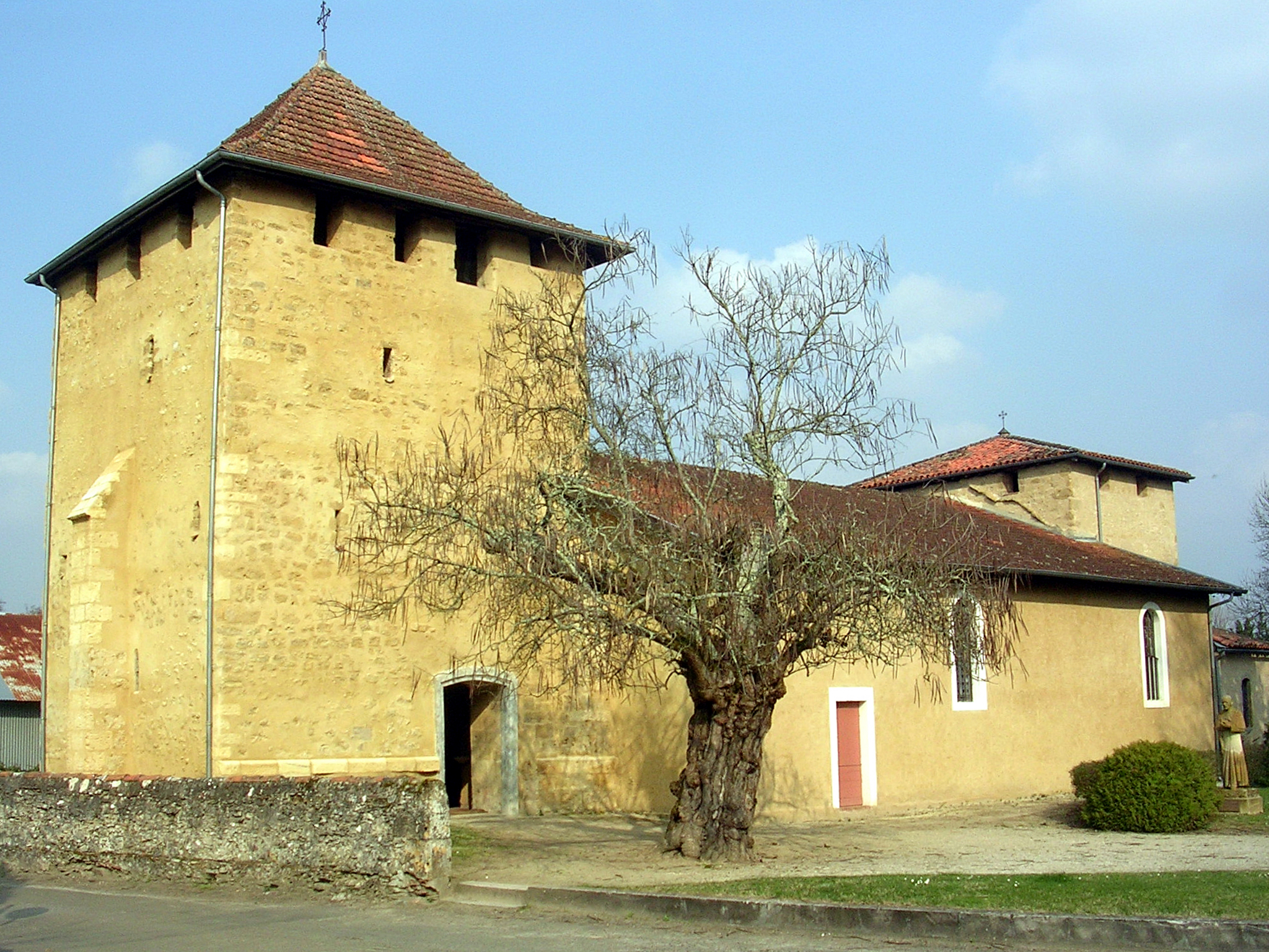 Eglise de Saint-Martin d'Oney, dans le département français des Landes